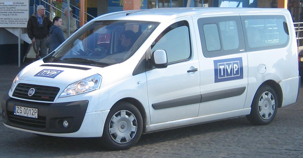 Fiat Scudo w wersji dla Telewizji Polskie